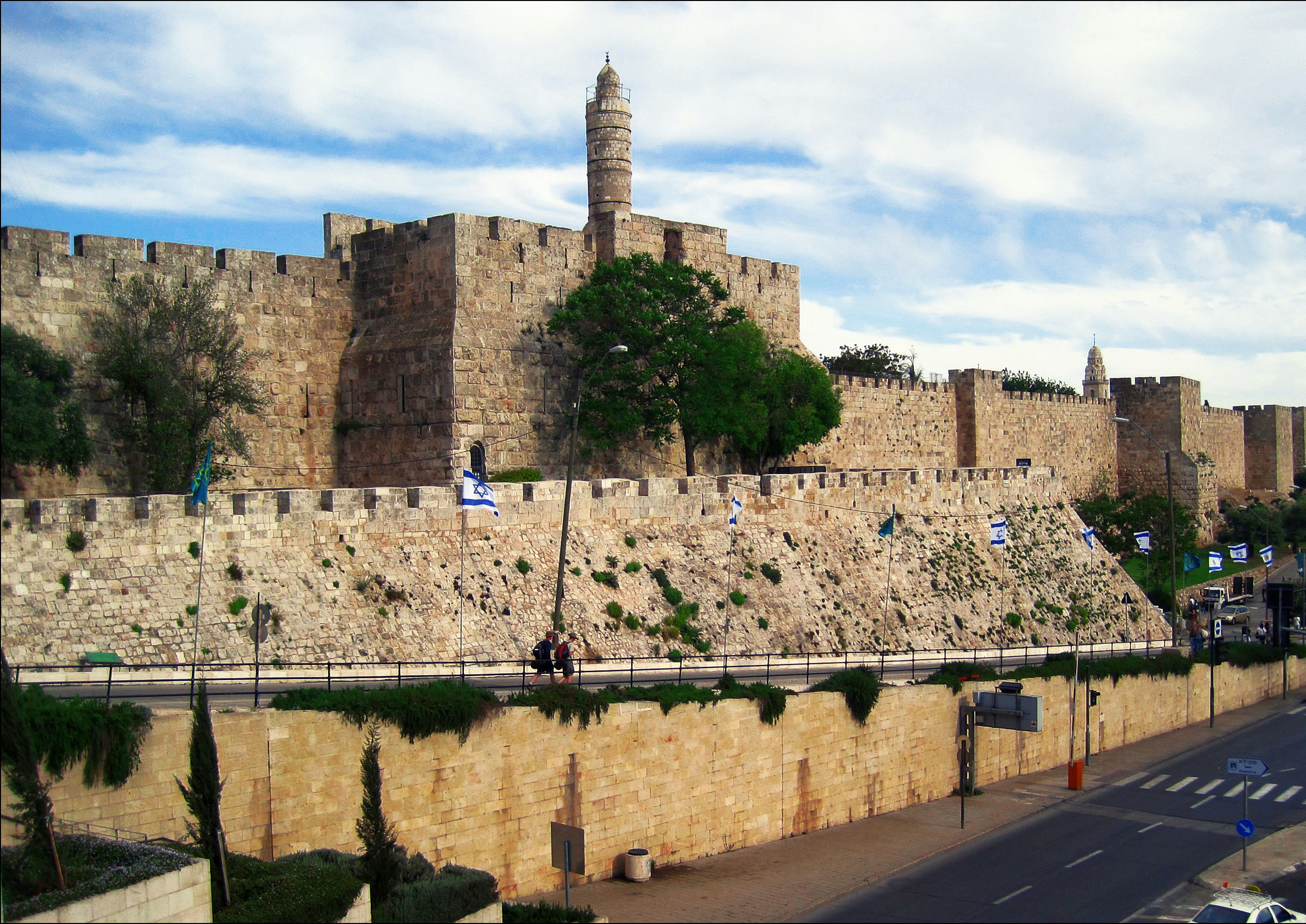 חומות העיר העתיקה נמנות עם נכסי מורשת התרבות החשובים של ירושלים. הן ללא ספק מונומנט בולט ומשפיע בנוף האורבני של העיר בעבר ובהווה. החומה, כפי שהיא מוכרת כיום, נבנתה בתקופה העות'מאנית, בשנת 1537, על ידי הסולטן סולימאן הגדול, והיא המאוחרת ממערכות הביצורים שהקיפו את ירושלים במשך ההיסטוריה.